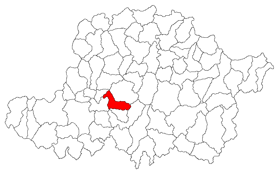 Categorie:Hărţi ale judeţului Arad